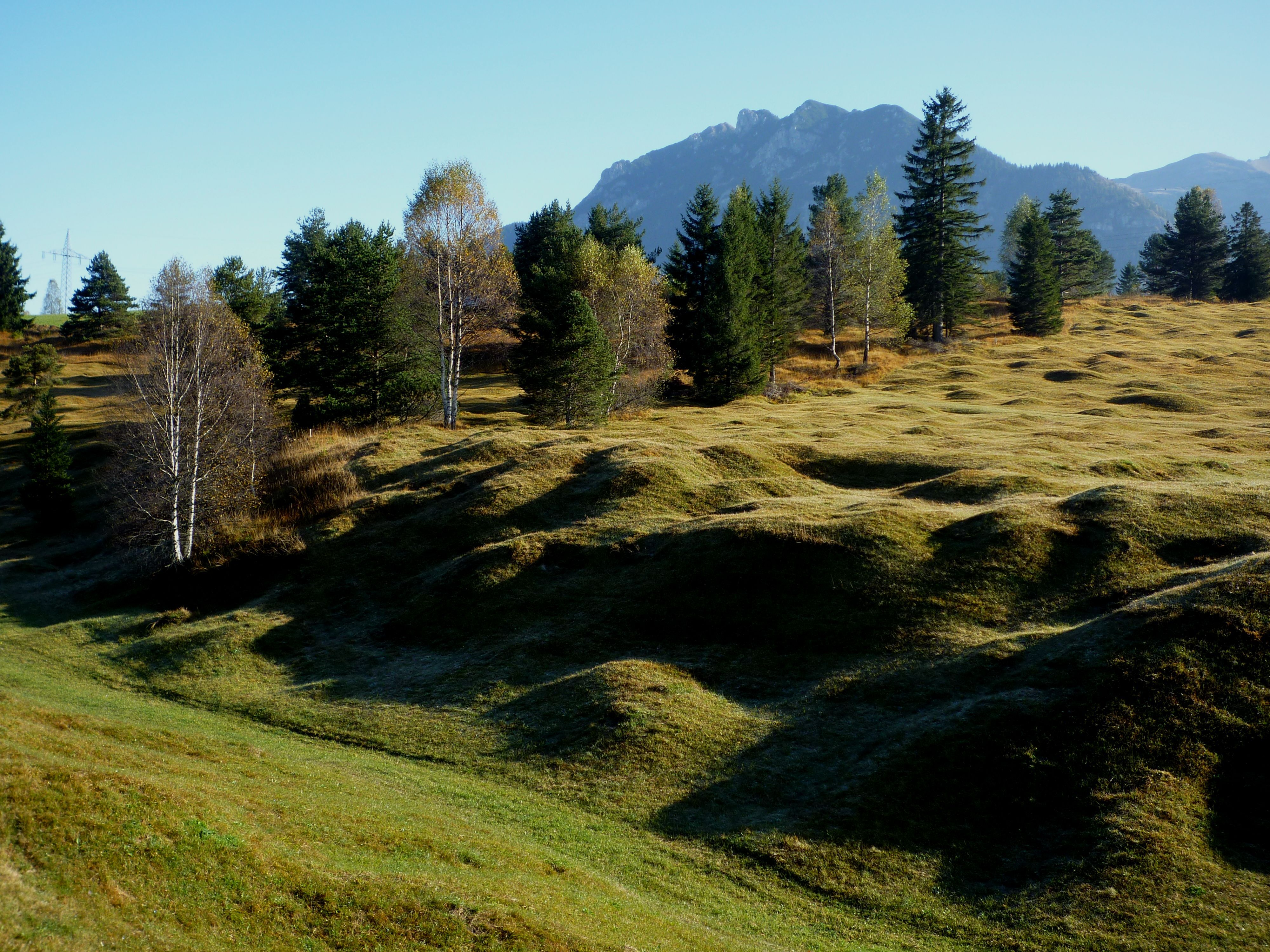 Krün - Gebiet: periglaziales Karst Phänomen Bucckelwiesen, Soierngruppe_02